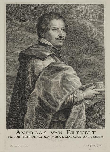 Andries van Eertvelt (1590-1652)